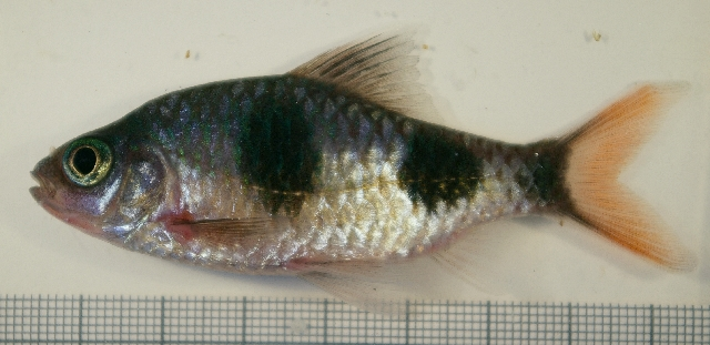 Dreibandbarbe (Dawkinsia arulius)